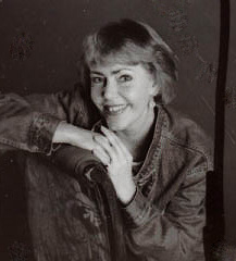 Norwegian author Guri Børrehaug Hagen (born 1947)